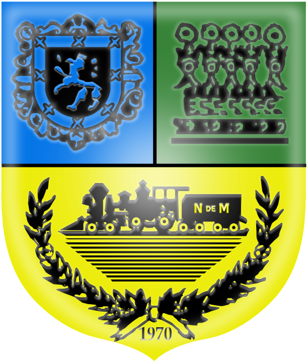 Este es el escudo del municipio de Matìas Romero, Oax. Esta imagen lo hice utilizando Inkscape.